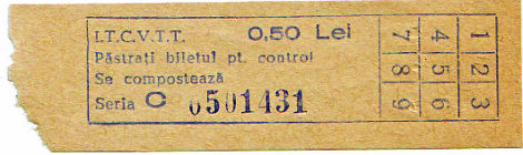 historischer Fahrschein der Straßenbahn Timisoara